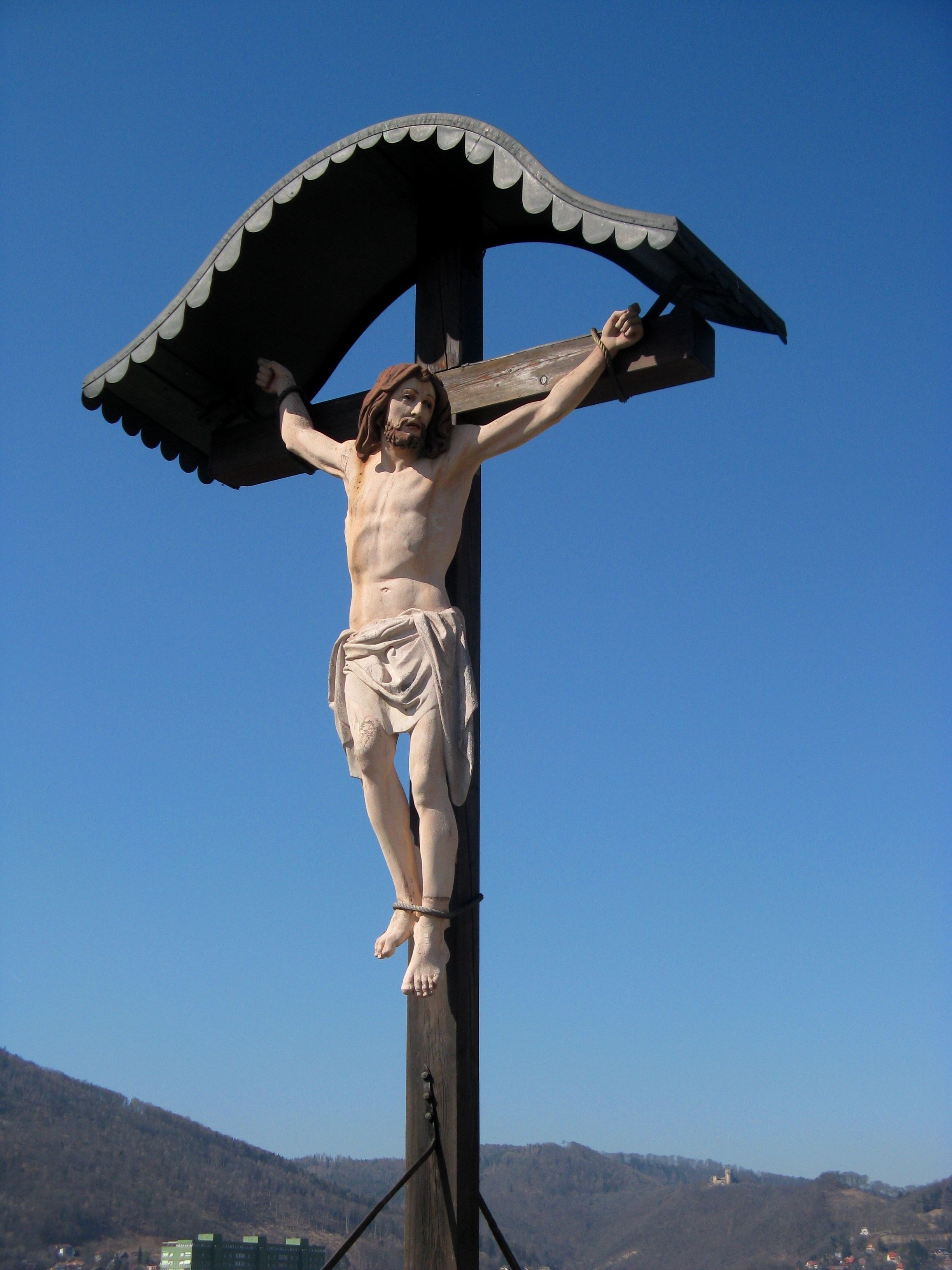 Grazer Kalvarienberg, Kreuzigungsgruppe, Dismas von Jakob Gschiel, 1880